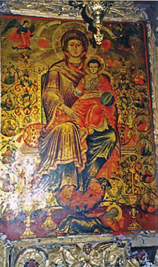 Богородица с Исус Христос, 1815 г., престолна икона от църквата "Свето Преображение", Самарина.